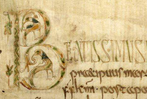 un fragment du Lectionnaire de Luxeuil de la Bibliothèque nationale de france.